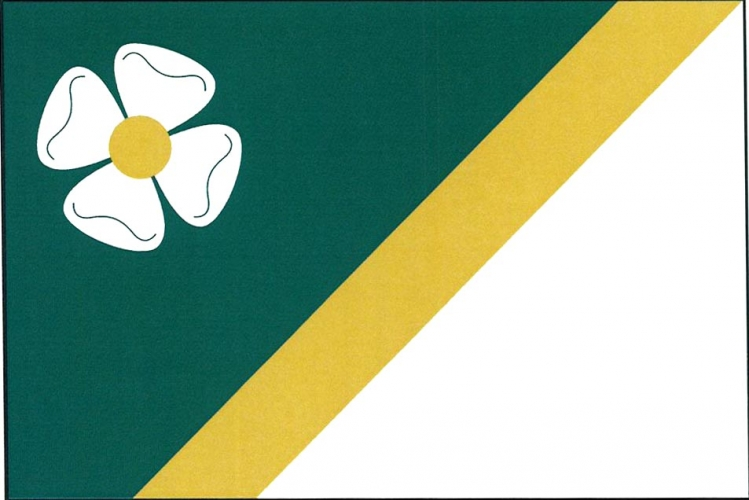 vlajka, Kravsko, okres Znojmo